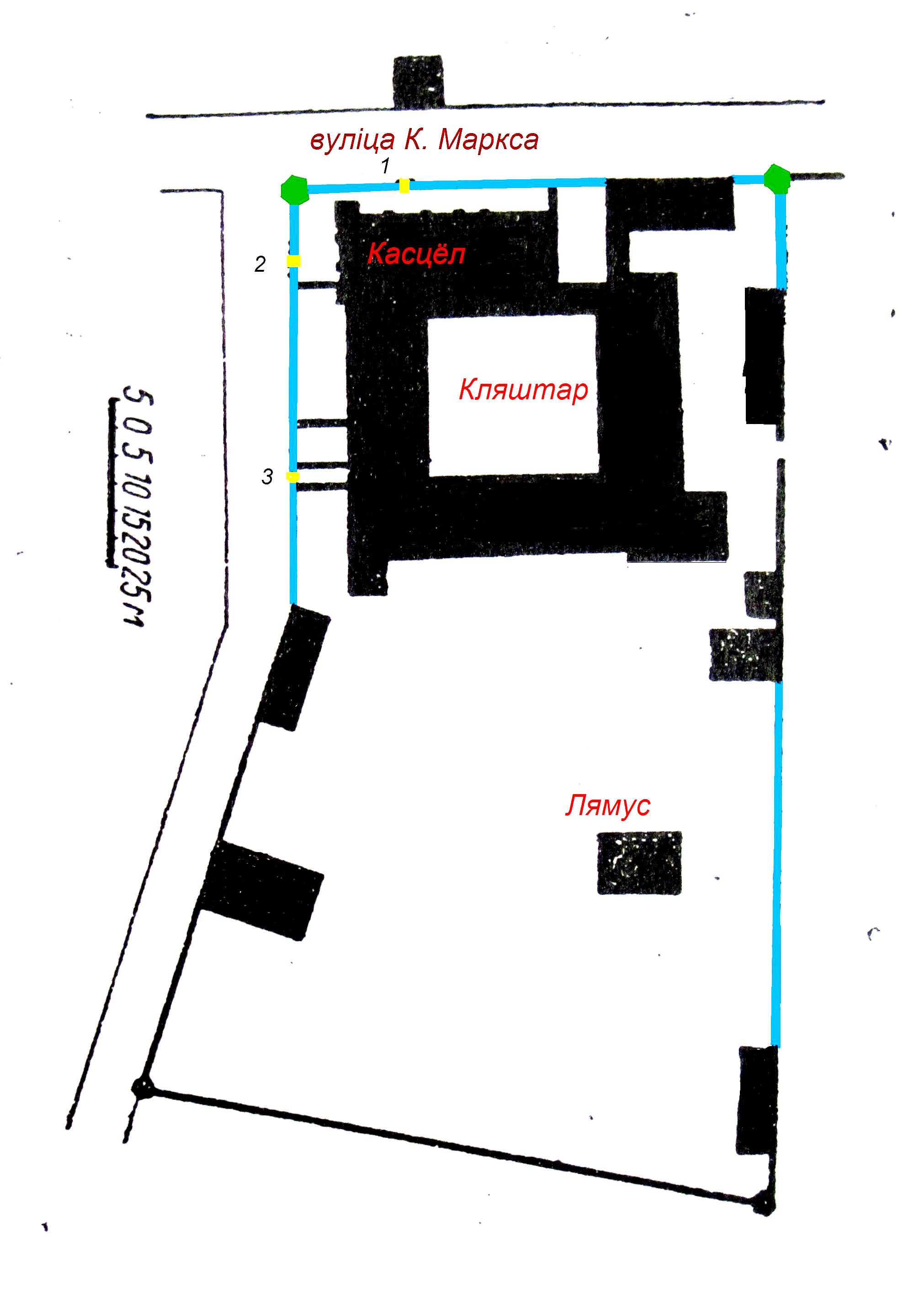 Плян кляштара ордэна брыгітак у Гродне (Маркса)